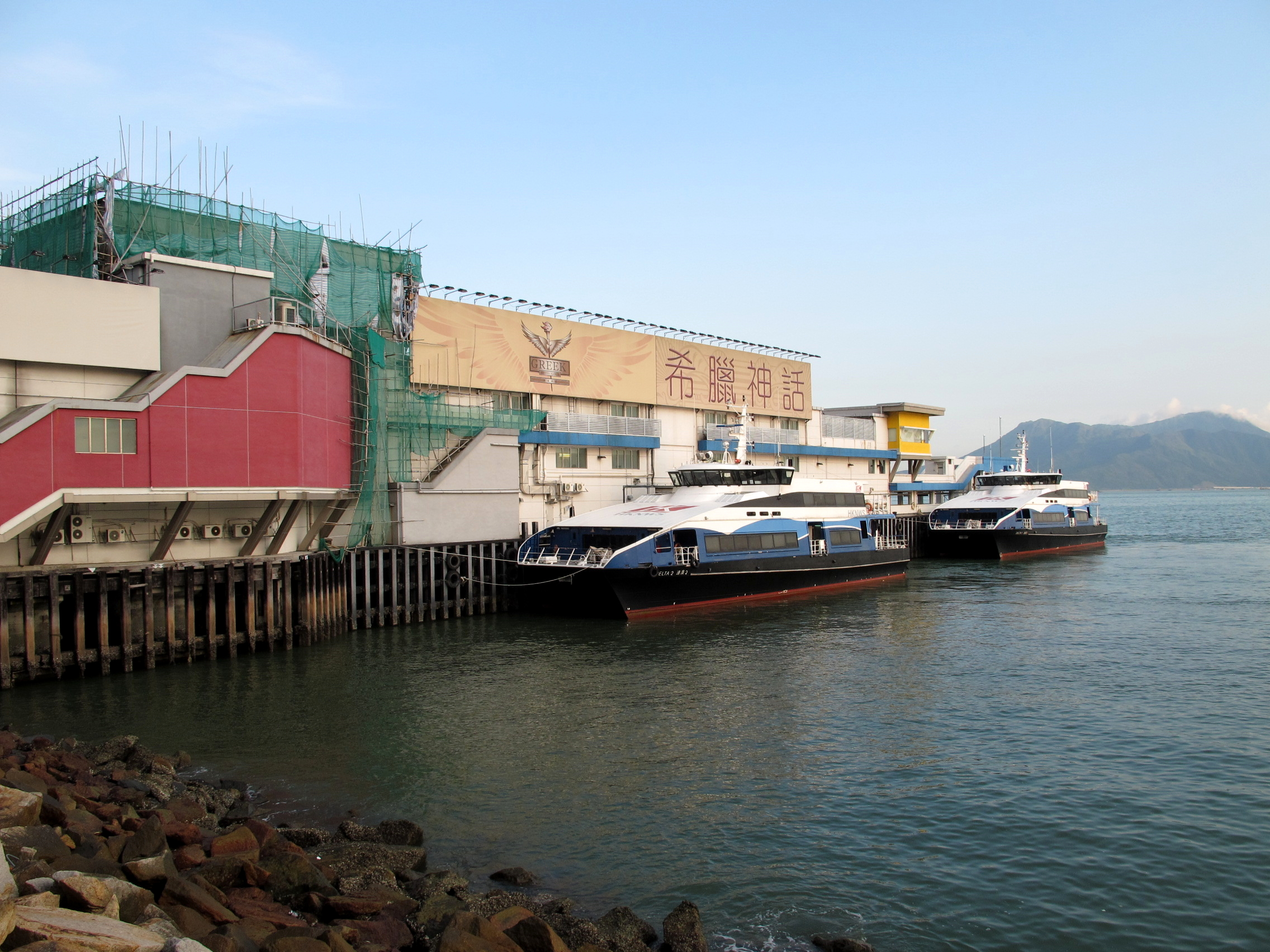 Tuen Mun Ferry Pier